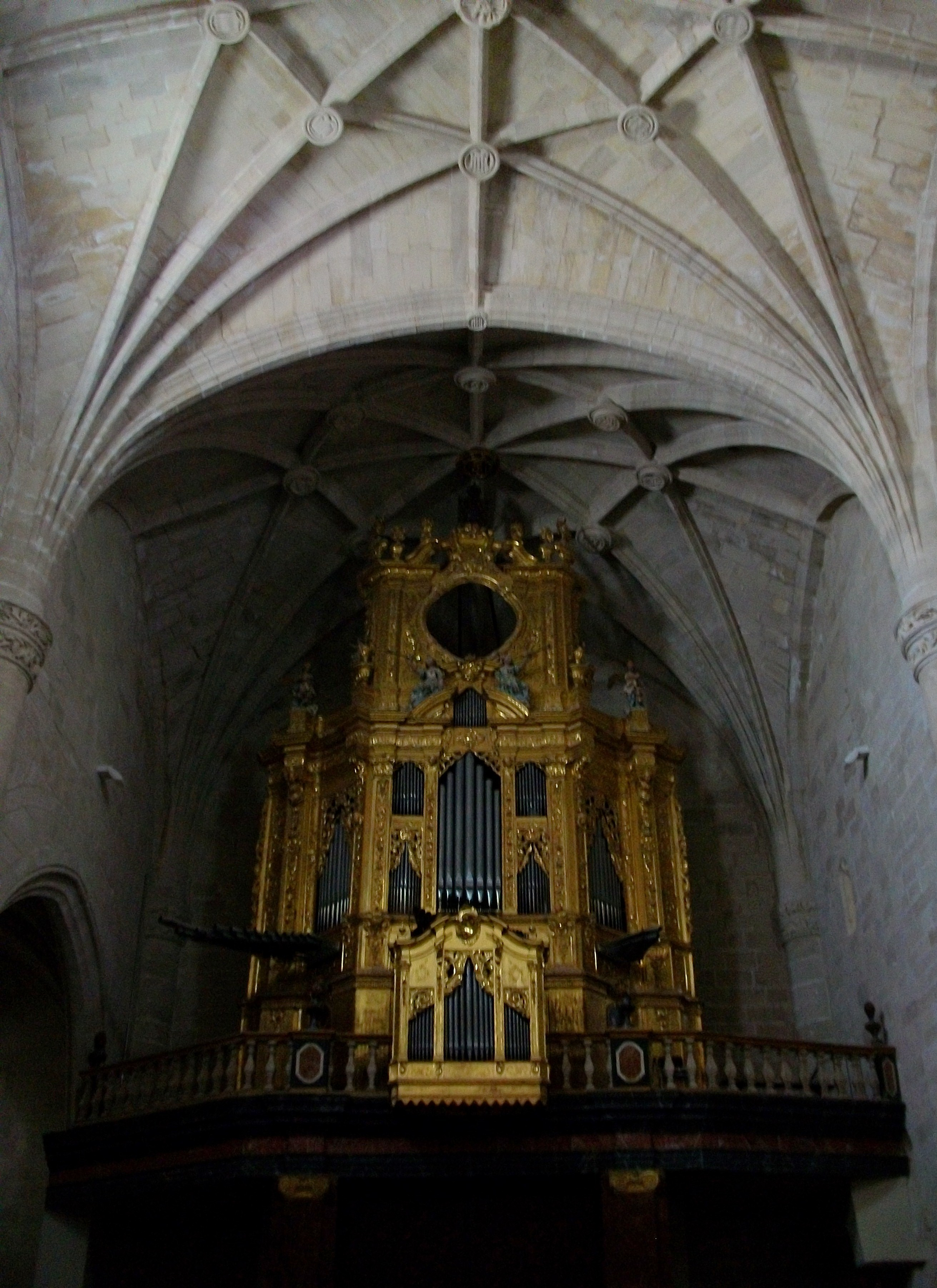 Orgue de l'església de sant Jaume Apòstol, Oriola.